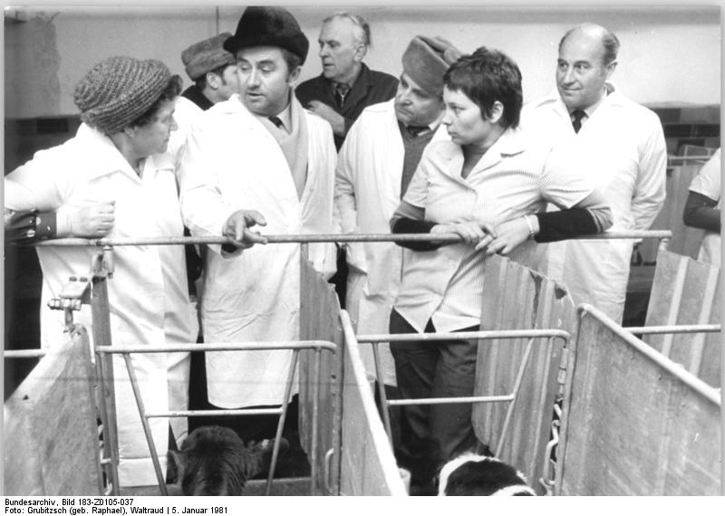 LPG Bennewitz, Besuch von Heinz Kuhrig ADN-ZB Grubitzsch ba-5-1-81-Leipzig: In der LPG Tierproduktion "Ernst Thälmann" Bennewitz, Kreis Wurzen, informieren die Vorsitzende der LPG, Frieda Sternberg (l), und Anlagenleiterin Beate Pfarr (2.v.r.) Landwirtschaftsminister Heinz Kuhrig (2.v.l.) über ihre Vorhaben im Planjahr 1981. (Siehe dazu ADN-Meldung 852 vom 5.1.81, 15.47Uhr)